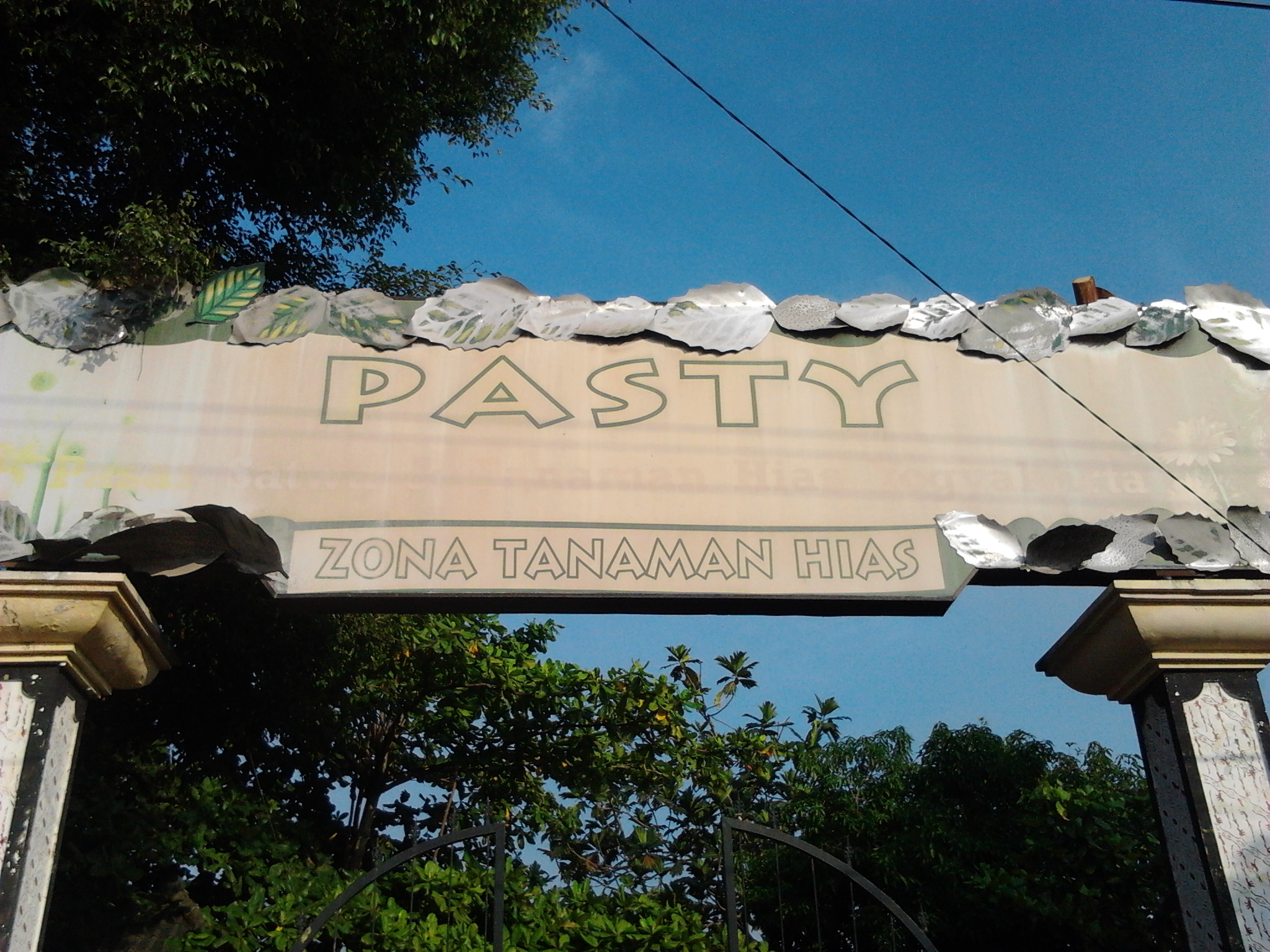 GERBANG ZONA TANAMAN